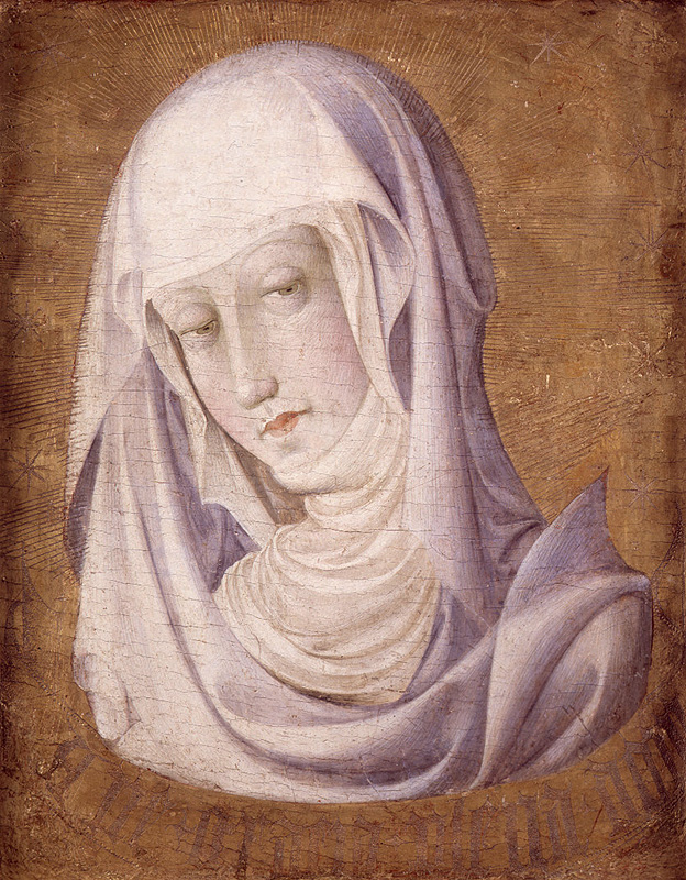 La obra representa la Verónica de la Virgen, la «vera efigies» de la Virgen María basada en el retrato efectuado por san Lucas de la Virgen.